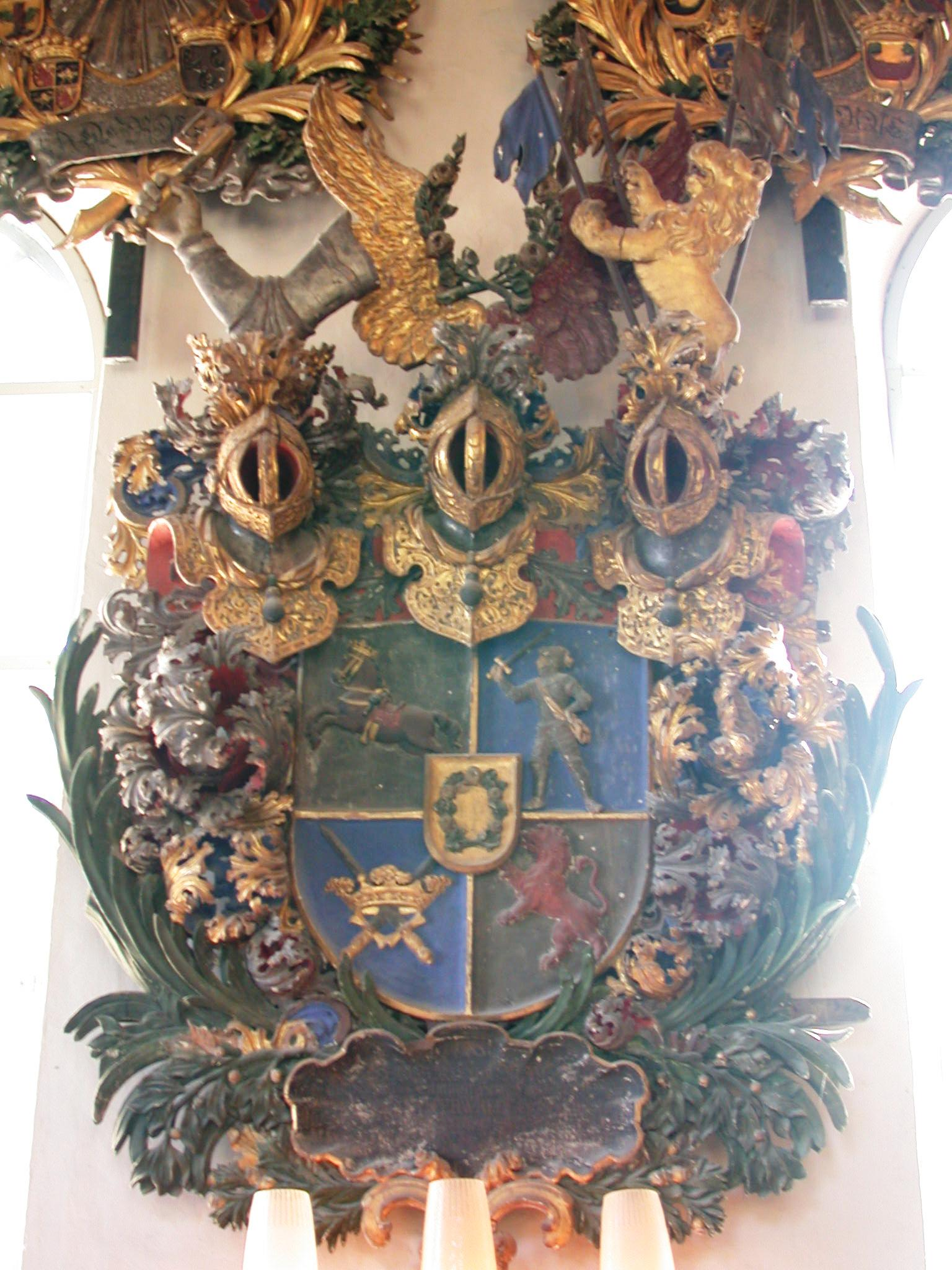 Wrede epitaph, Björklinge kyrka, Uppsala, Sweden. Photo by Riggwelter, July 16, 2006.